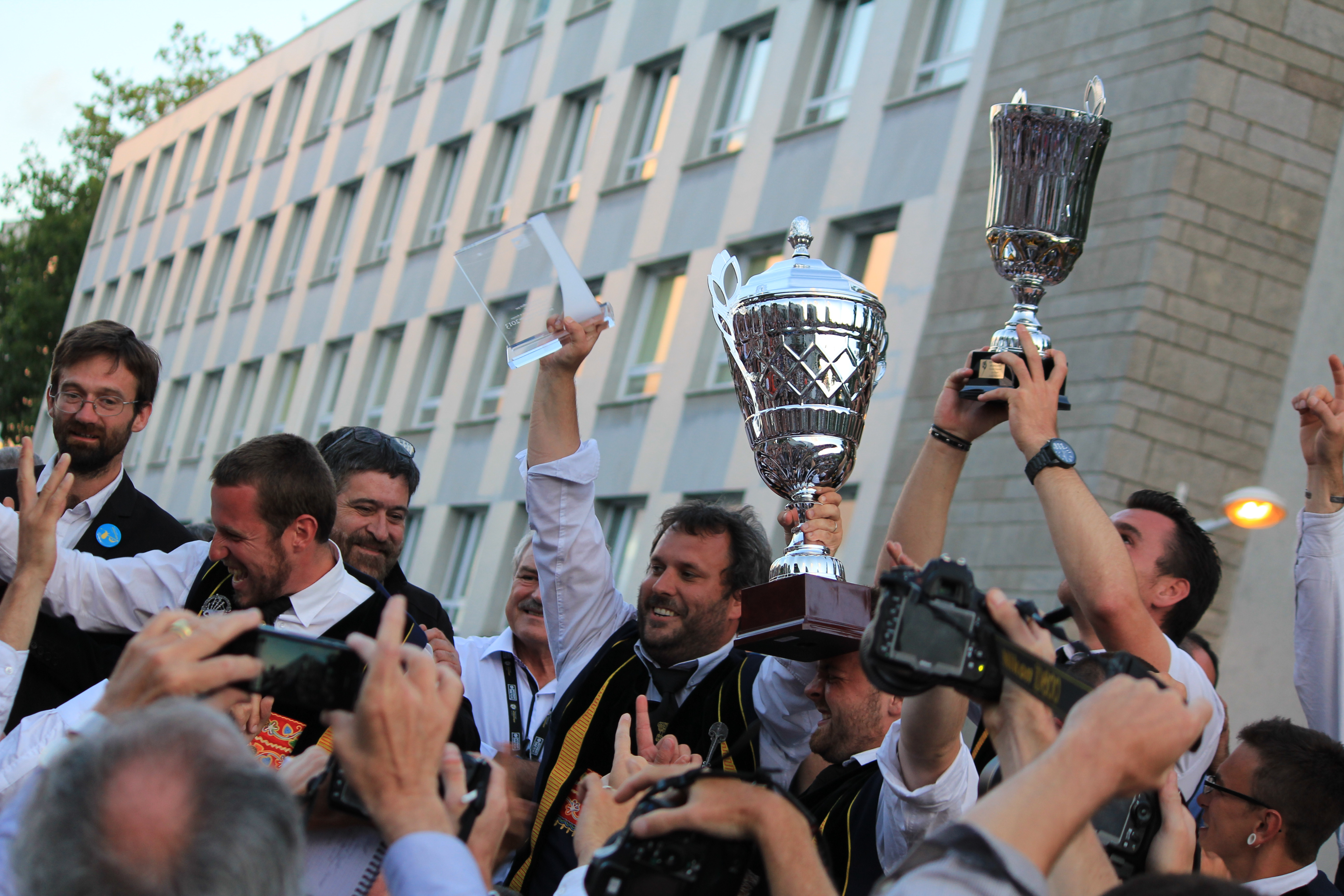 Annonce des résultats du championnat national des bagadoù 2013 dans le cadre du festival interceltique de Lorient : Bagad Kemper